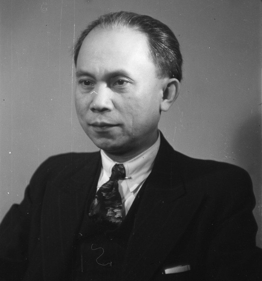 Hoofdbestuur PvdA. L.N. Palar lid van de Tweede Kamer voor de PvdA